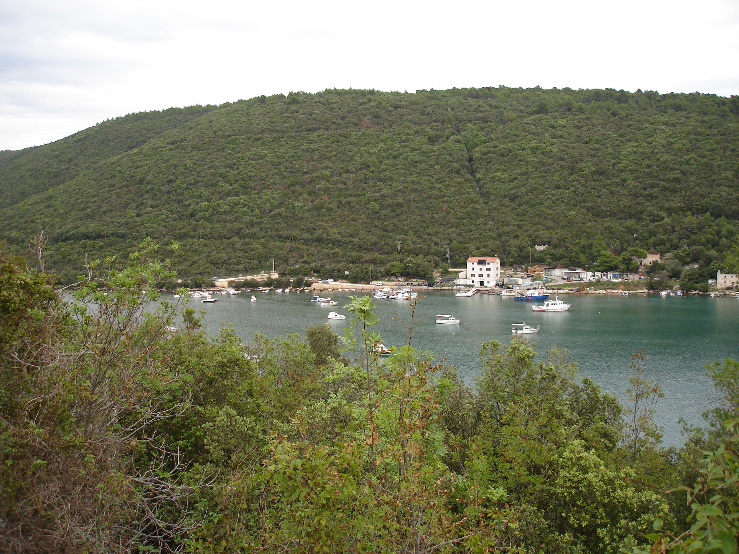 Luka u uvali Vela Budava